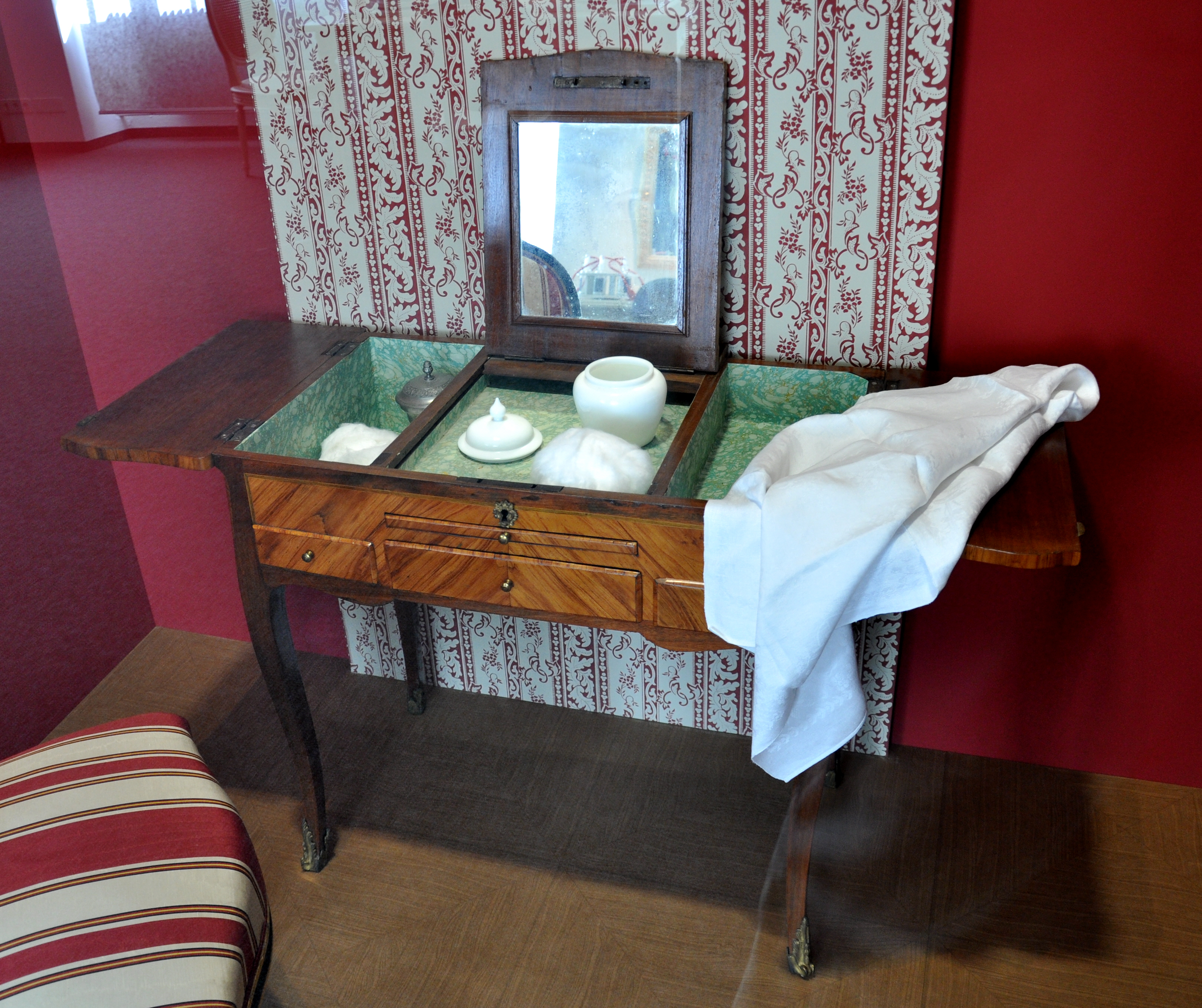 Poudreuse, Johann Jacob Christoph Kieser (1734–1786) zugeschrieben, um 1765–1770, aus Schloss Schwetzingen Ausstellung "Das stille Örtchen – Tabu und Reinlichkeit bey Hofe" der Staatlichen Schlösser und Gärten Baden-Württemberg, Bad Schussenried; Staatliche Schlösser und Gärten Baden-Württemberg, Inv. Nr. G 6944